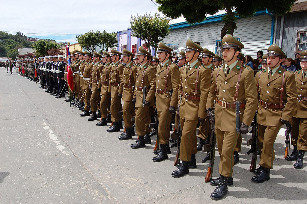 Talcahuano celebró a lo grande sus 246 años